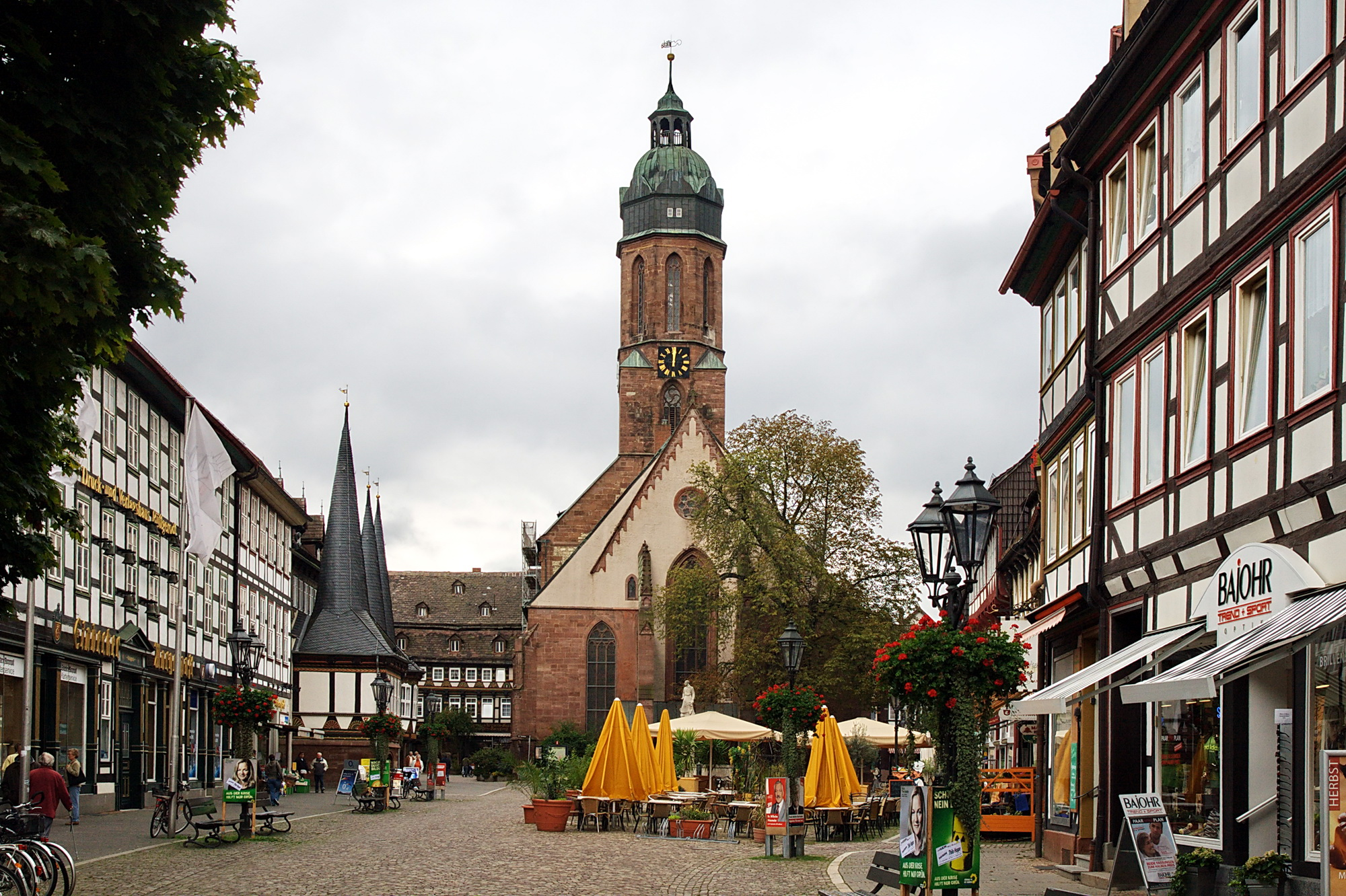 Marktplatz in Einbeck, Niedersachsen, Deutschland